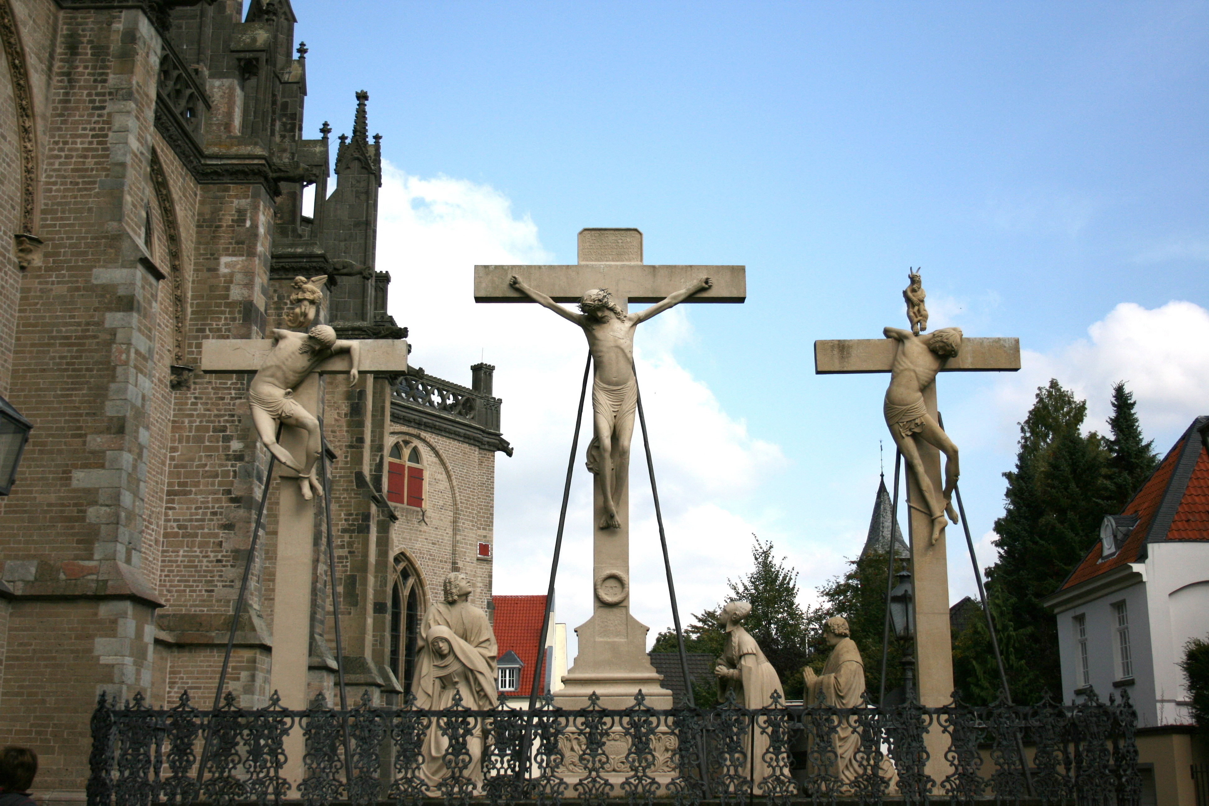 Dom in Xanten